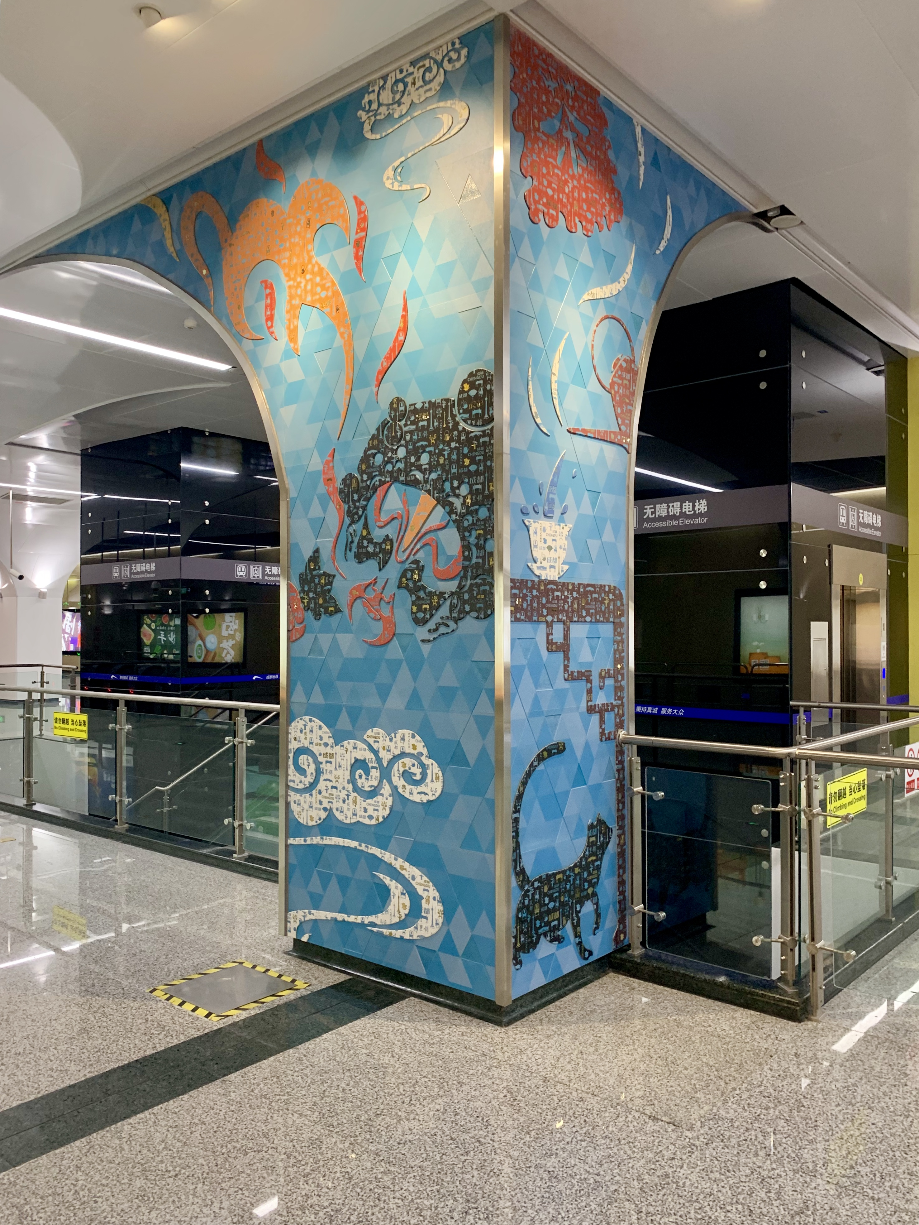 成都地铁广州路站